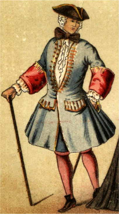 Herrdräkt (1730-40)